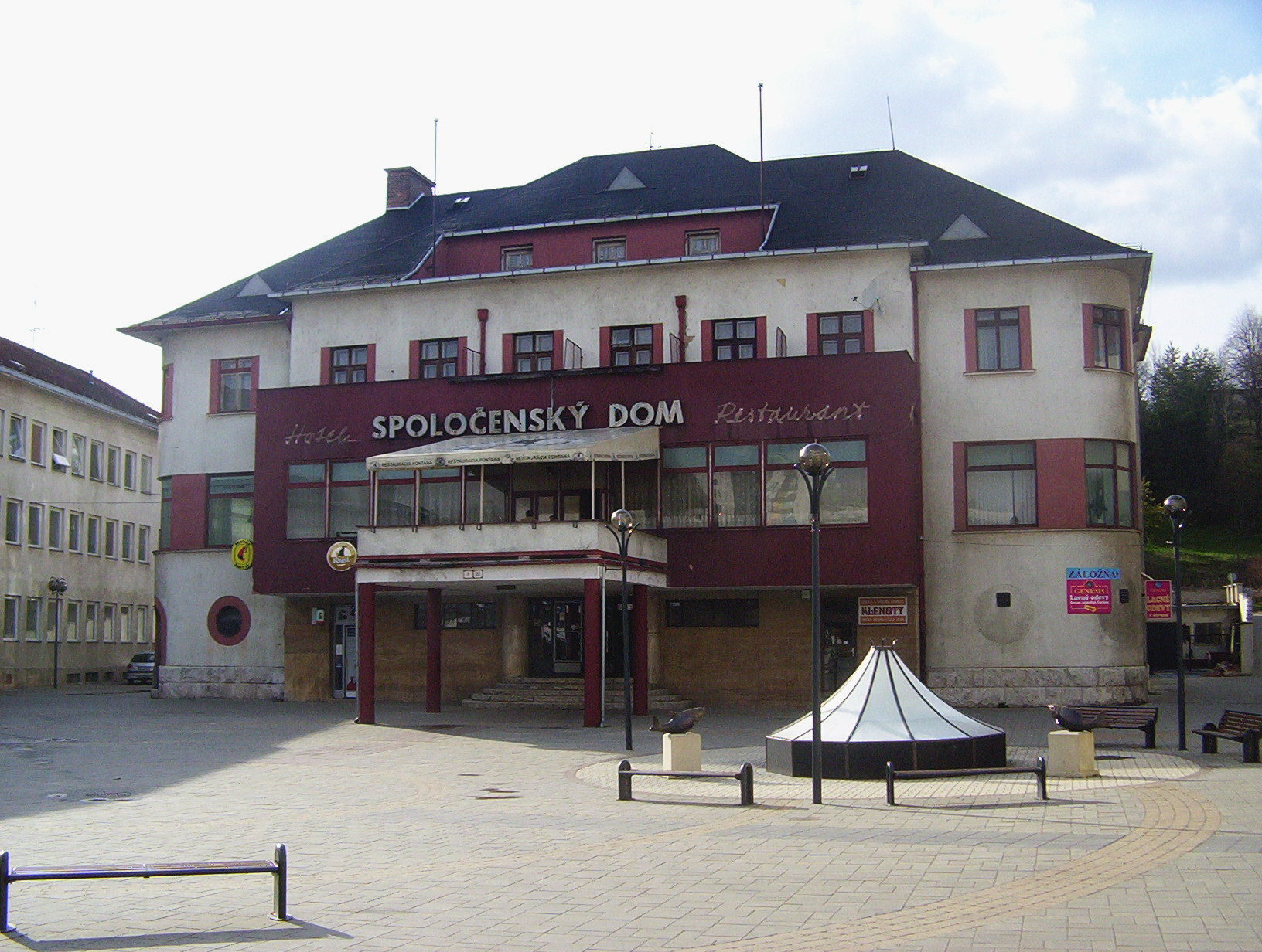 Spoločenský dom Myjava